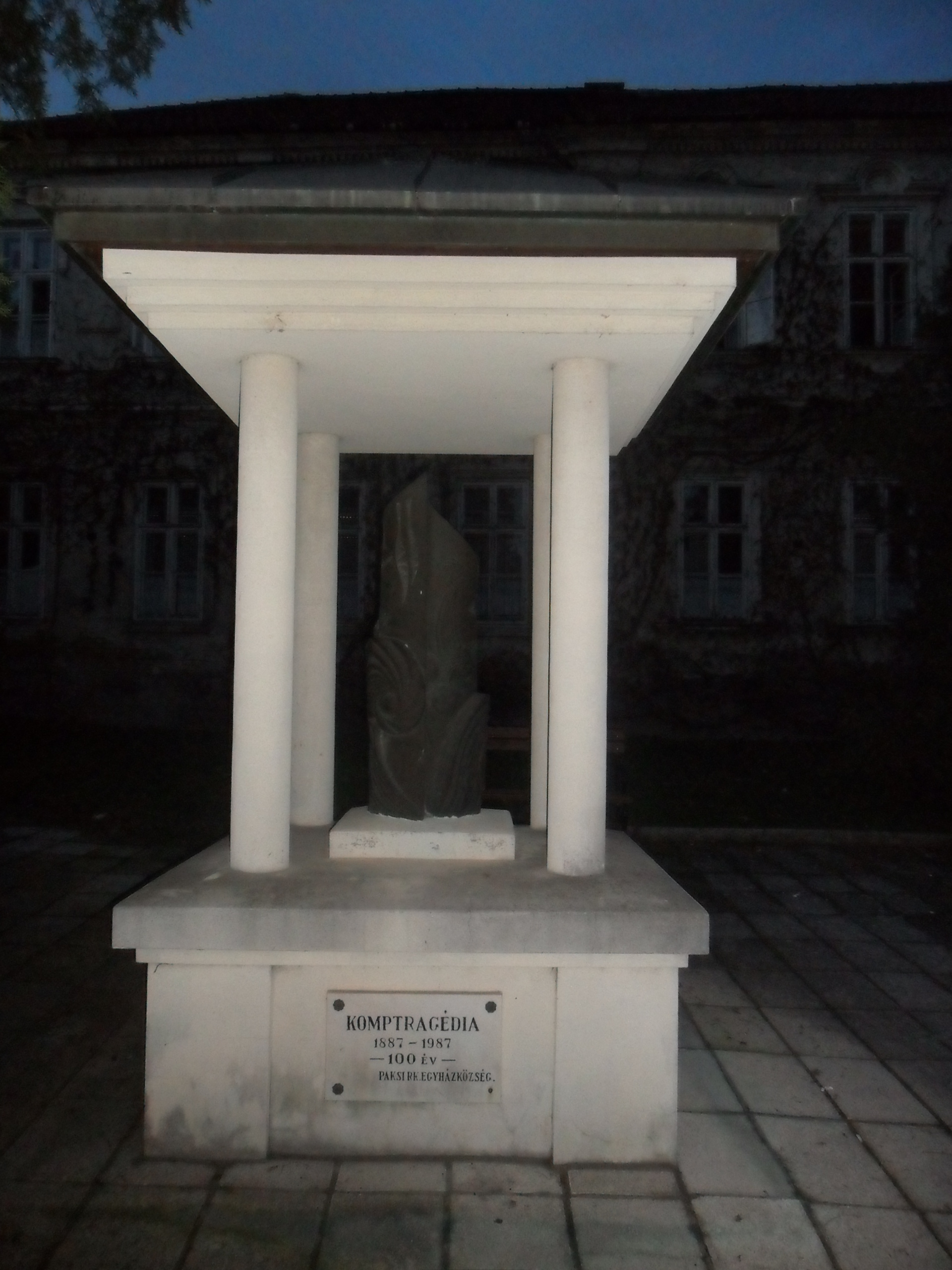 A biskói komptragédia 100. évfordulójára állított emlékmű Pakson